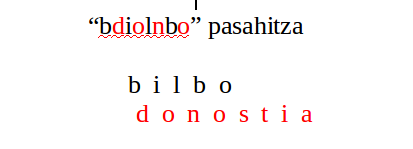 Nola sortu pasahitz bat bi hitzekoa letrak konbinatuz.